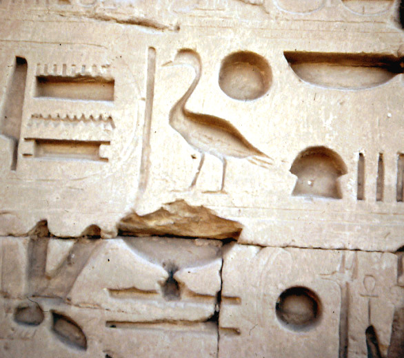 hieroglyphs in Karnak (Egypt)